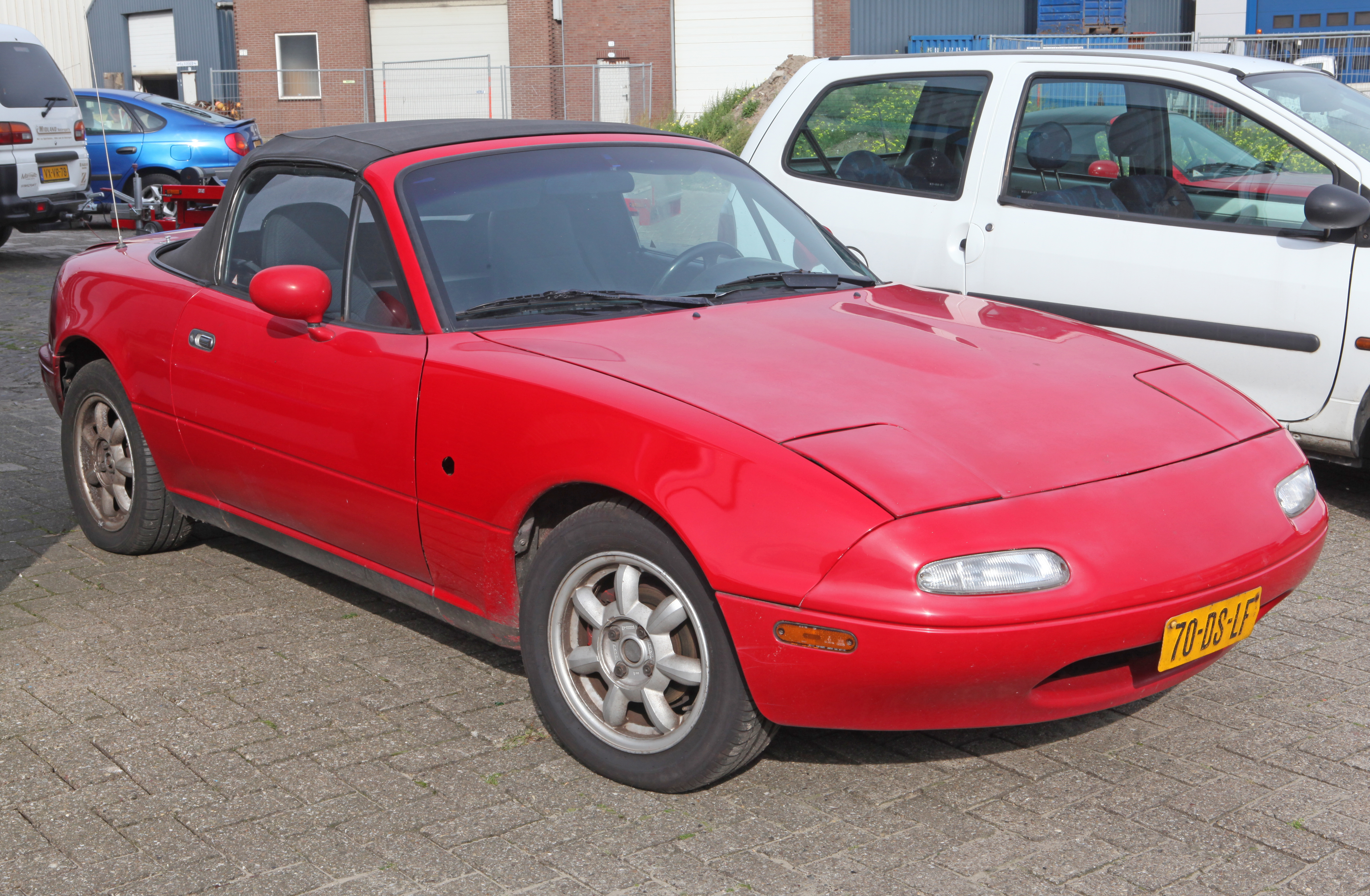 1990 Mazda MX 5 Miata 1.8